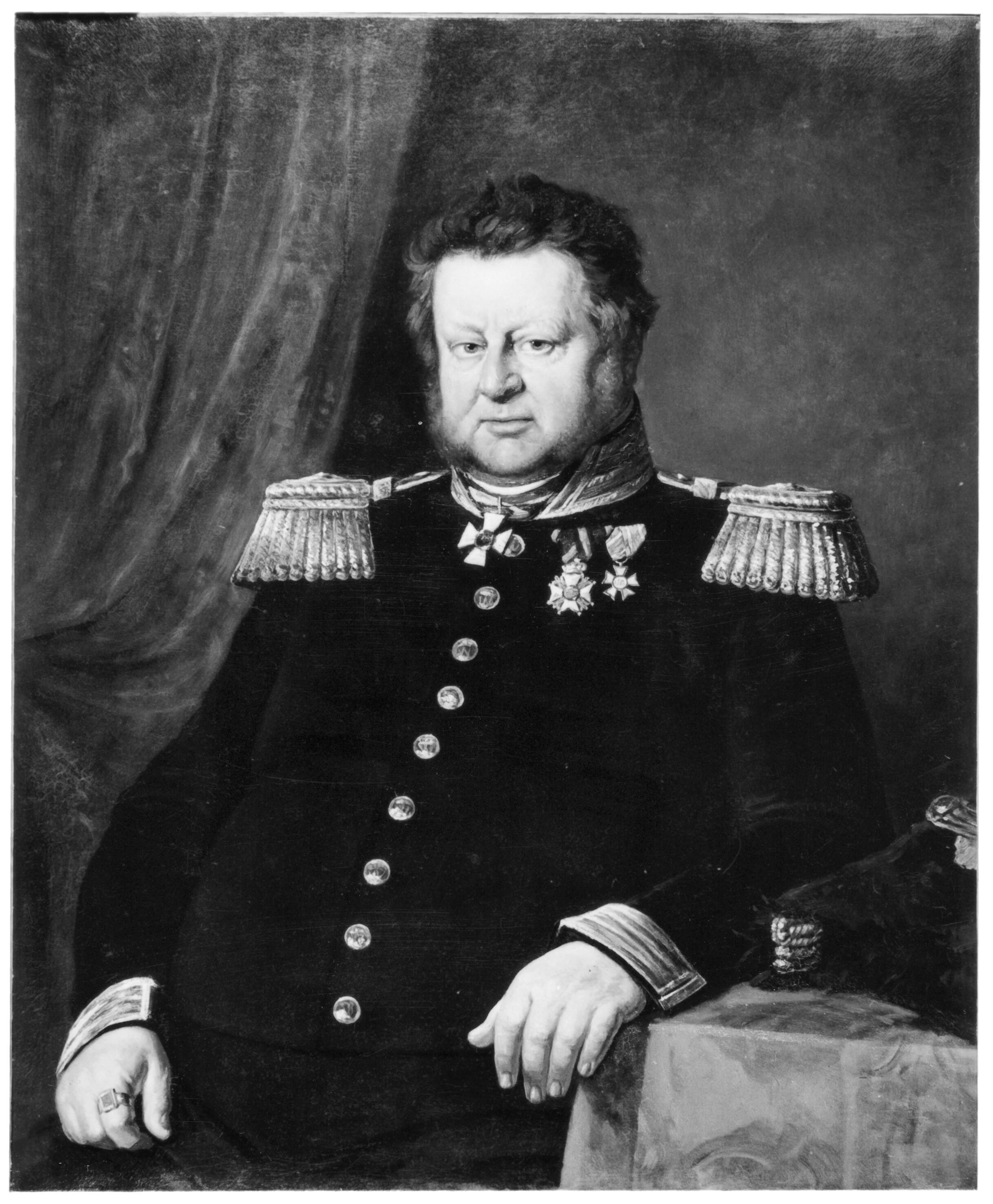 Portret van Willem Alberda van Ekenstein (1792-1869), olieverfschilderij